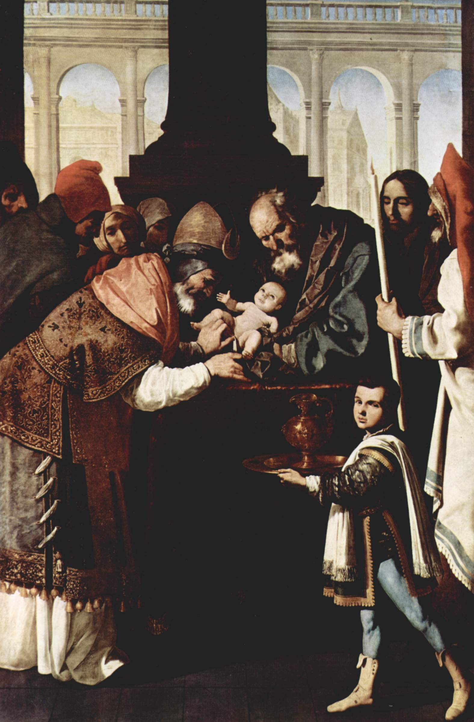 Hochaltar des Kartäuserkloster Nuestra Señora de la Defensión in Jerez de la Frontera, Szene: Die Beschneidung